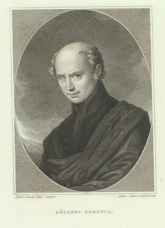 Kölcsey Ferenc (Sződemeter, 1790. augusztus 8. – Szatmárcseke, 1838. augusztus 23.)magyar költő, a magyar Himnusz költője